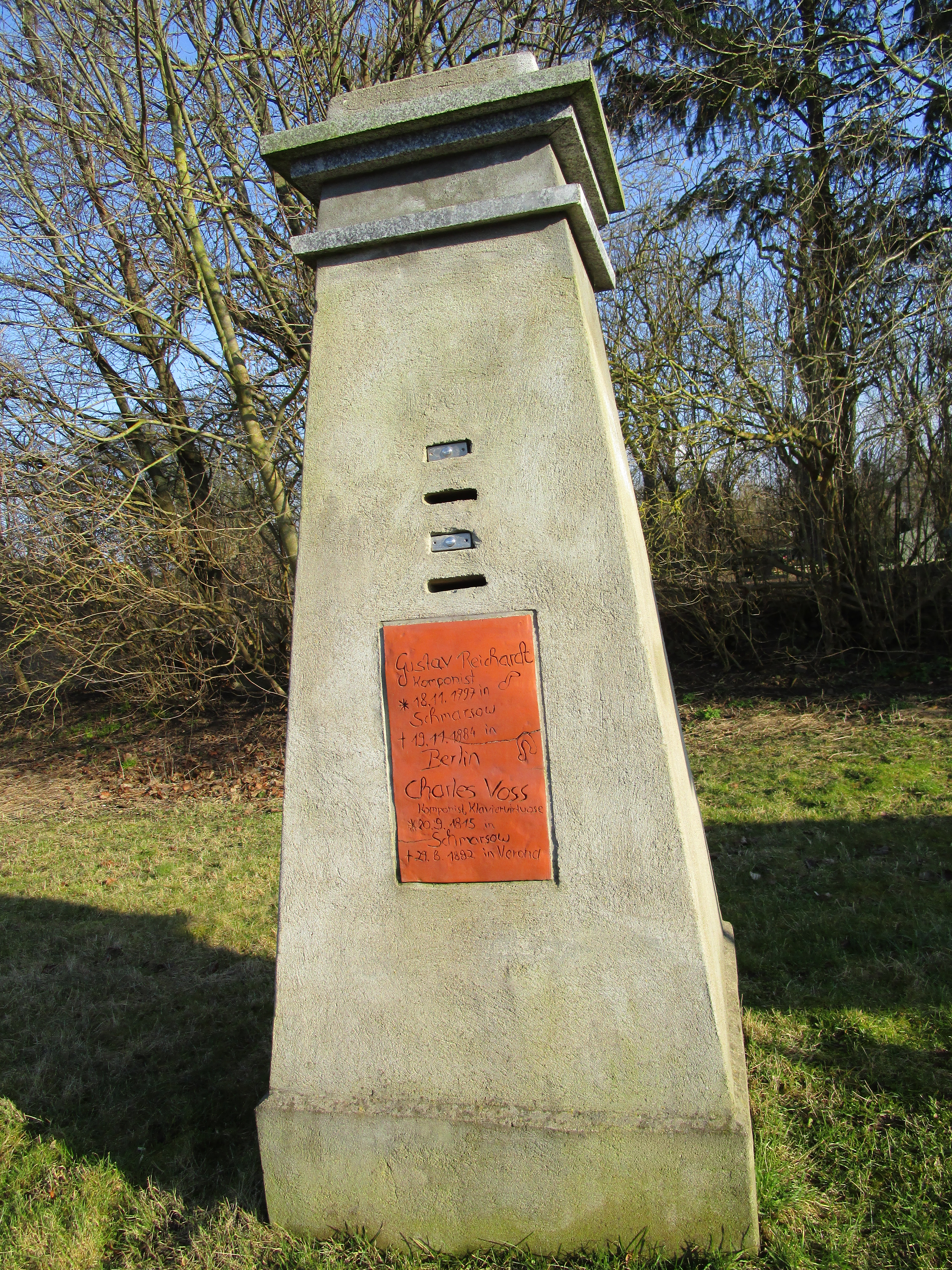 Gedenkstein für die in Schmarsow geborenen Musiker Gustav Reichardt und Charles Voss